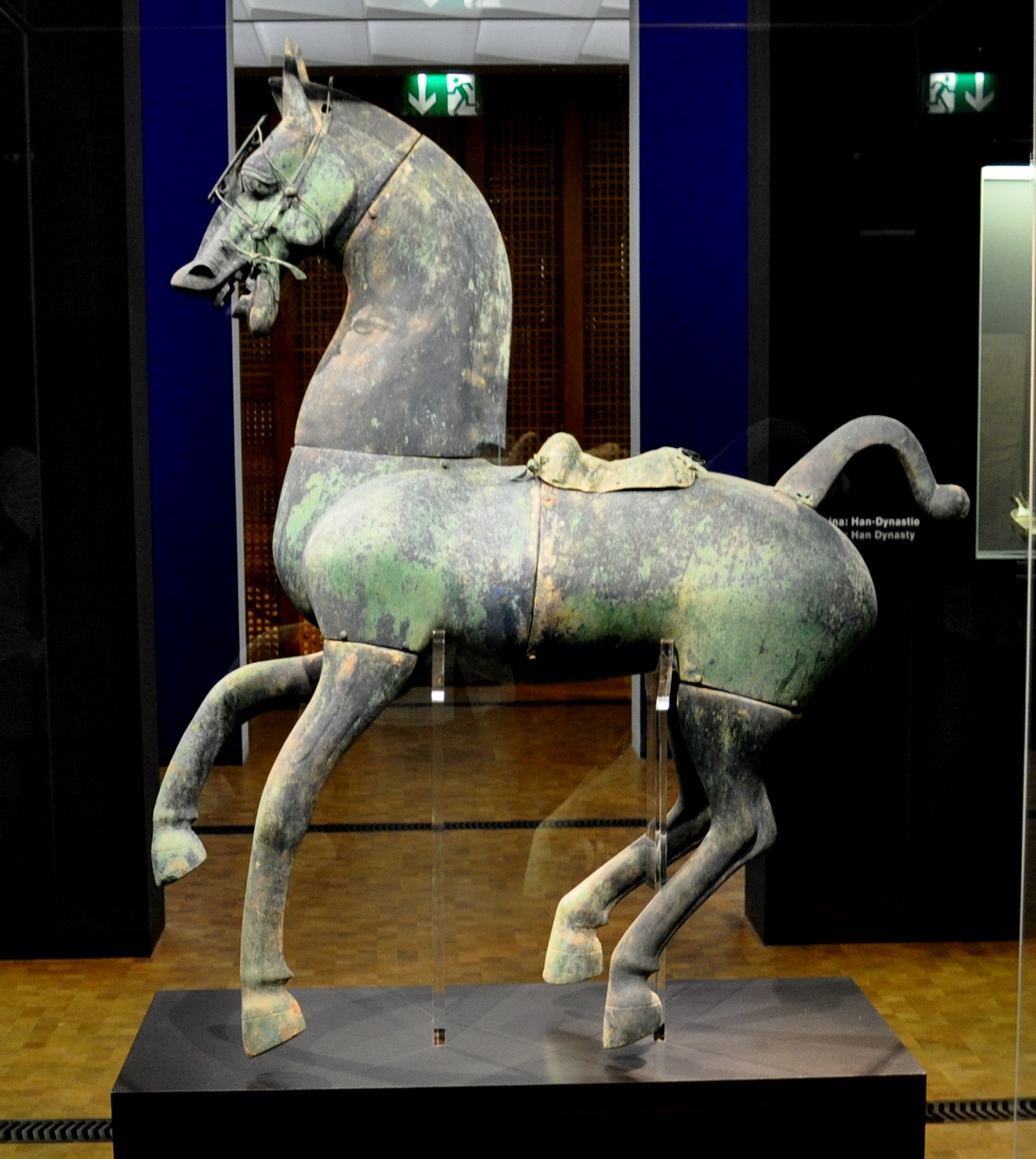 Pferd, östliche Han-Dynastie, 2. Jahrhundert, Bronze Museum Rietberg, Zürich; Geschenk Alice und Pierre Uldry